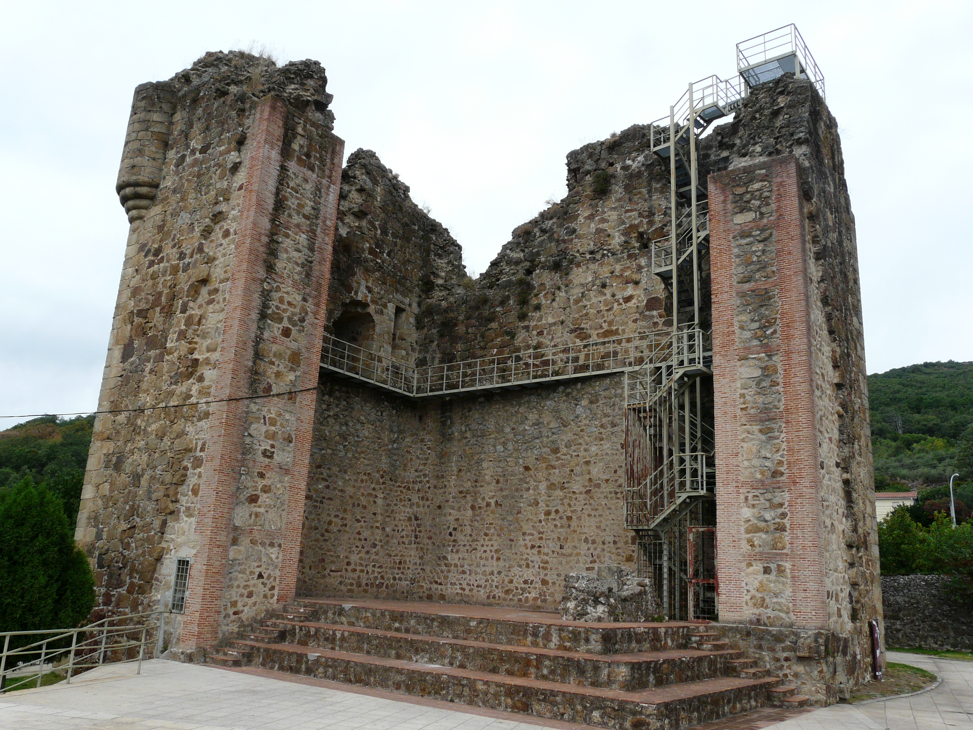 Castillo de Valverde de la Vera, provincia de Cáceres, España.